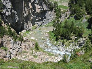 El Forau de Aigualluts (Benasque, Huesca, Aragón, España). Esta imagen ha sido tomada personalmente por Usuario:Avh